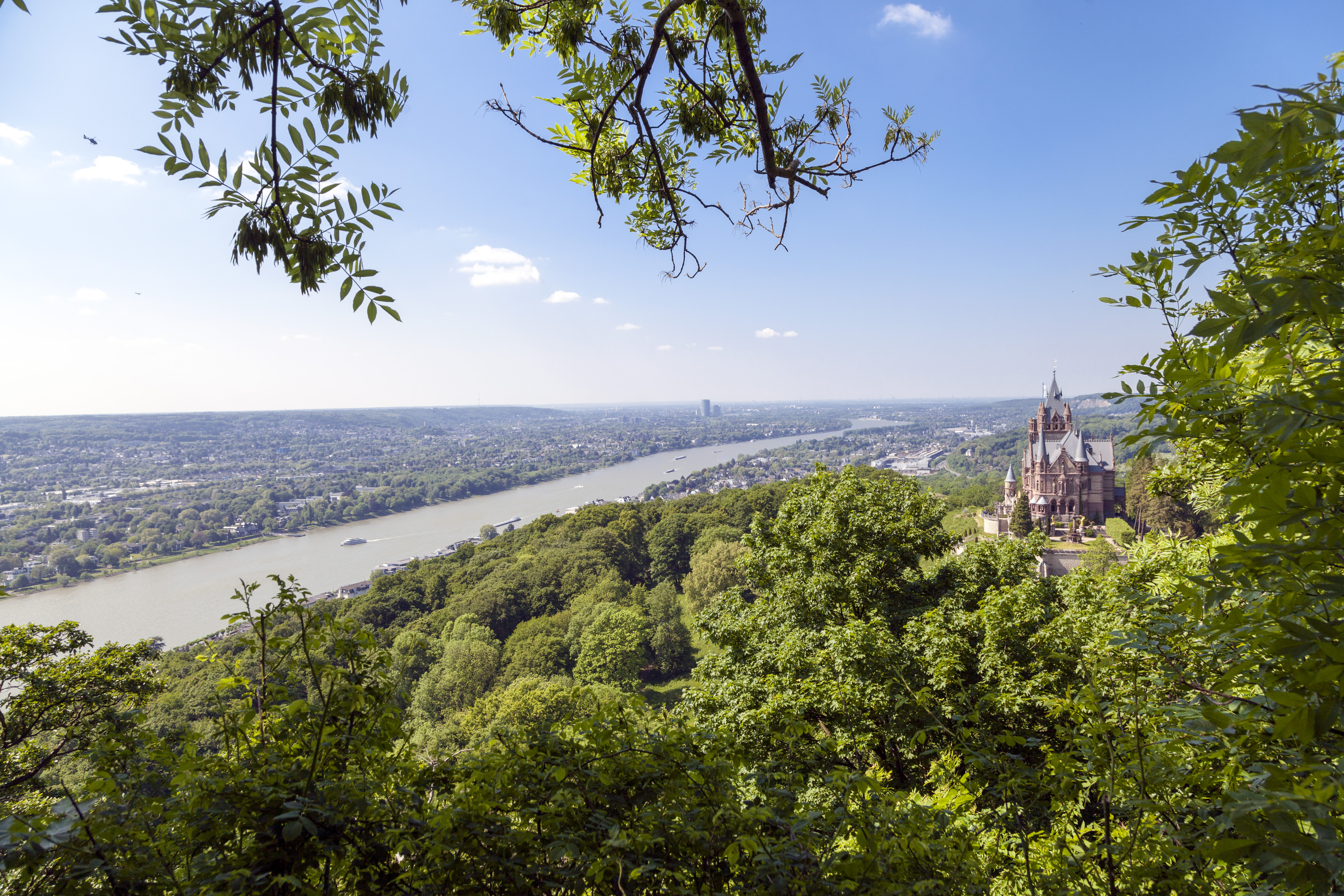 Blick über den Rhein auf die Drachenburg, Königswinter und Bonn.